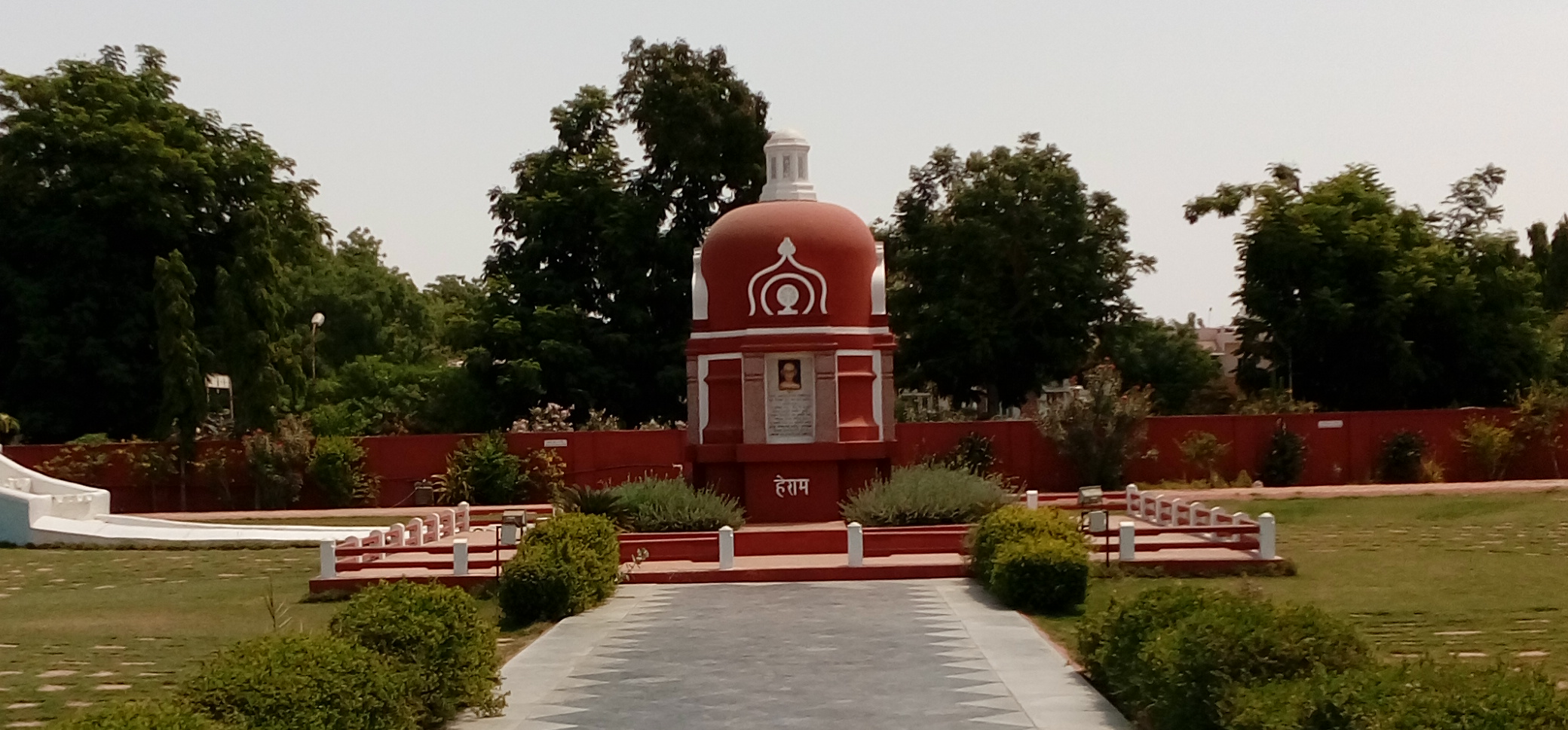 Gandhi Samadhi, a memorial dedicated to Mahatma Gandhi in Adipur, Kutch, Gujarat, India